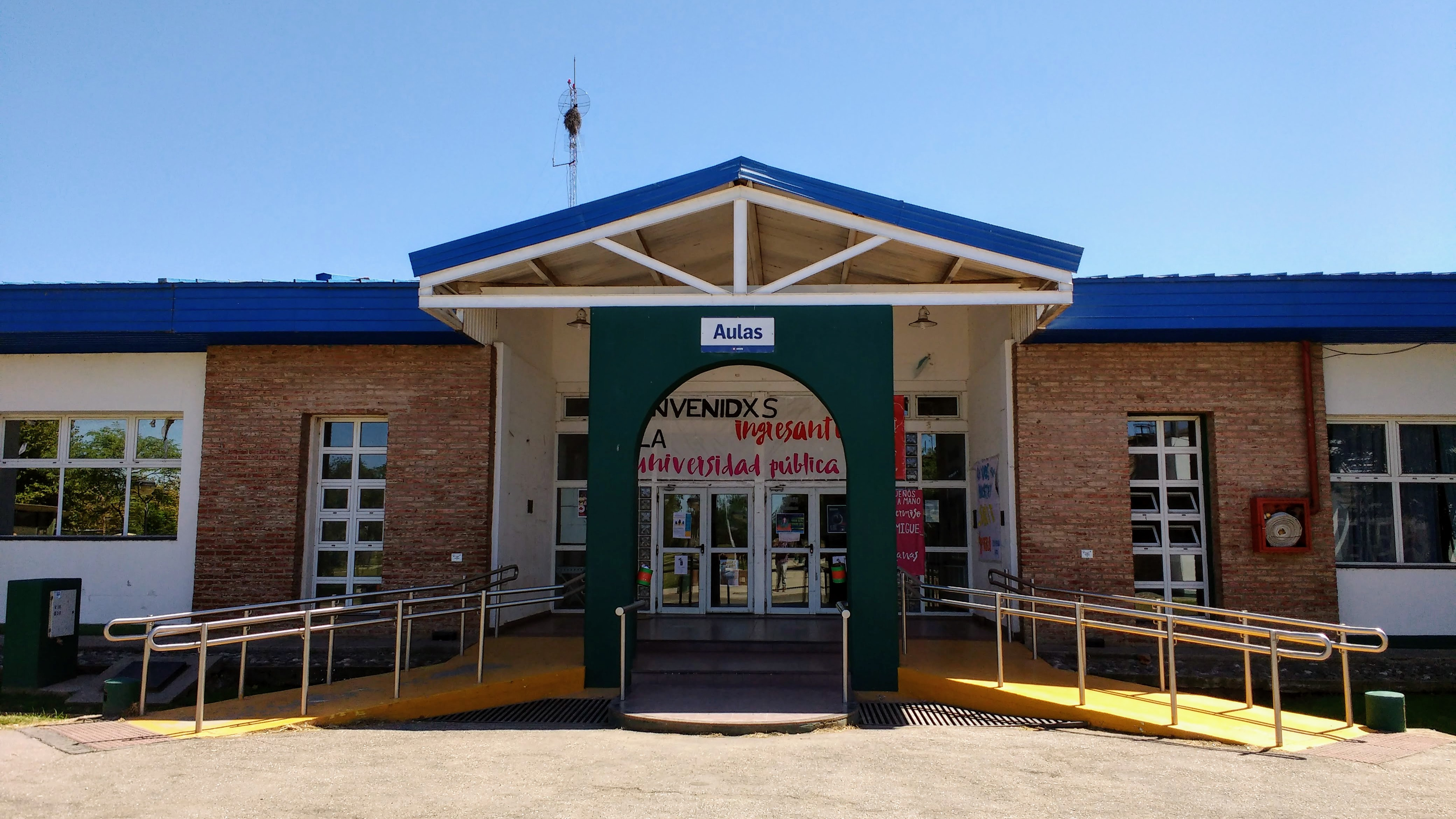 Bloque de aulas de la Universidad Nacional de Villa María, Córdoba, Argentina.